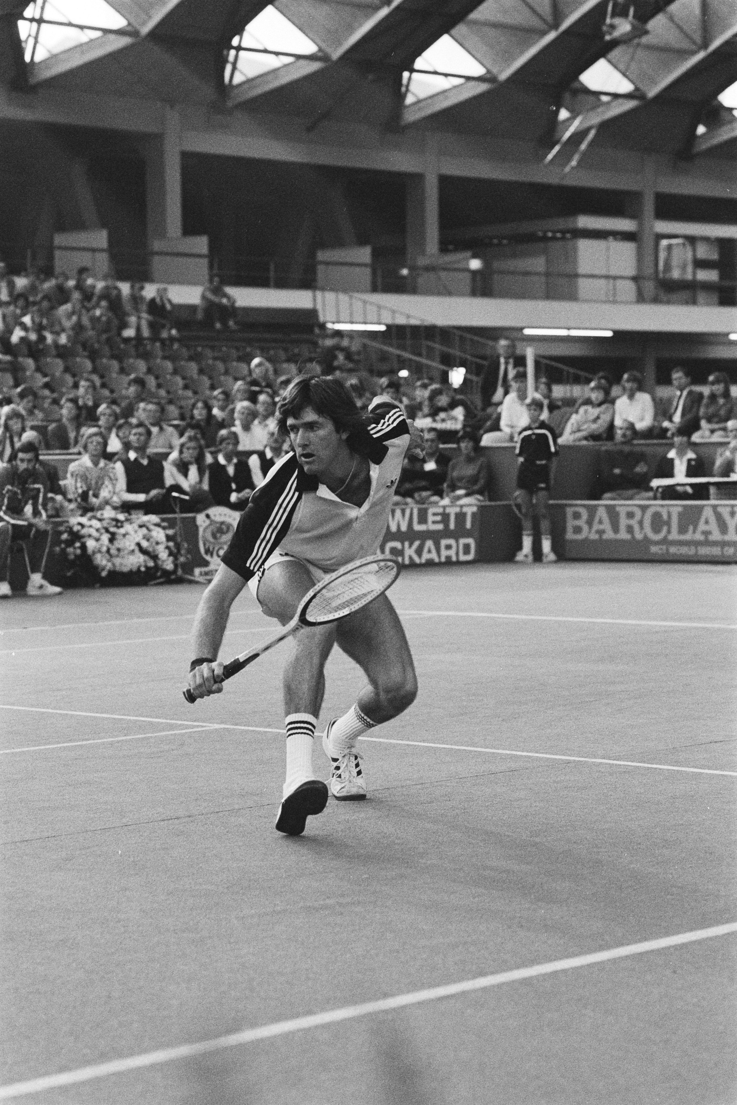 Collectie / Archief : Fotocollectie Anefo Reportage / Serie : Finale van het WCT-tennistoernooi Beschrijving : Zuidafrikaan Curren in actie Datum : 27 oktober 1982 Trefwoorden : finales, tennis Persoonsnaam : Curren, Kevin Fotograaf : Antonisse, Marcel / Anefo Auteursrechthebbende : Nationaal Archief Materiaalsoort : Negatief (zwart/wit) Nummer archiefinventaris : bekijk toegang 2.24.01.05 Bestanddeelnummer : 932-3750